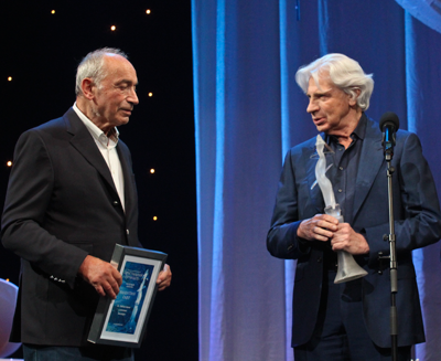 Валентин Гафт, премия «Хрустальная Турандот».